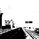 voorbeeld gif dithering, eigen foto, eigen werk.